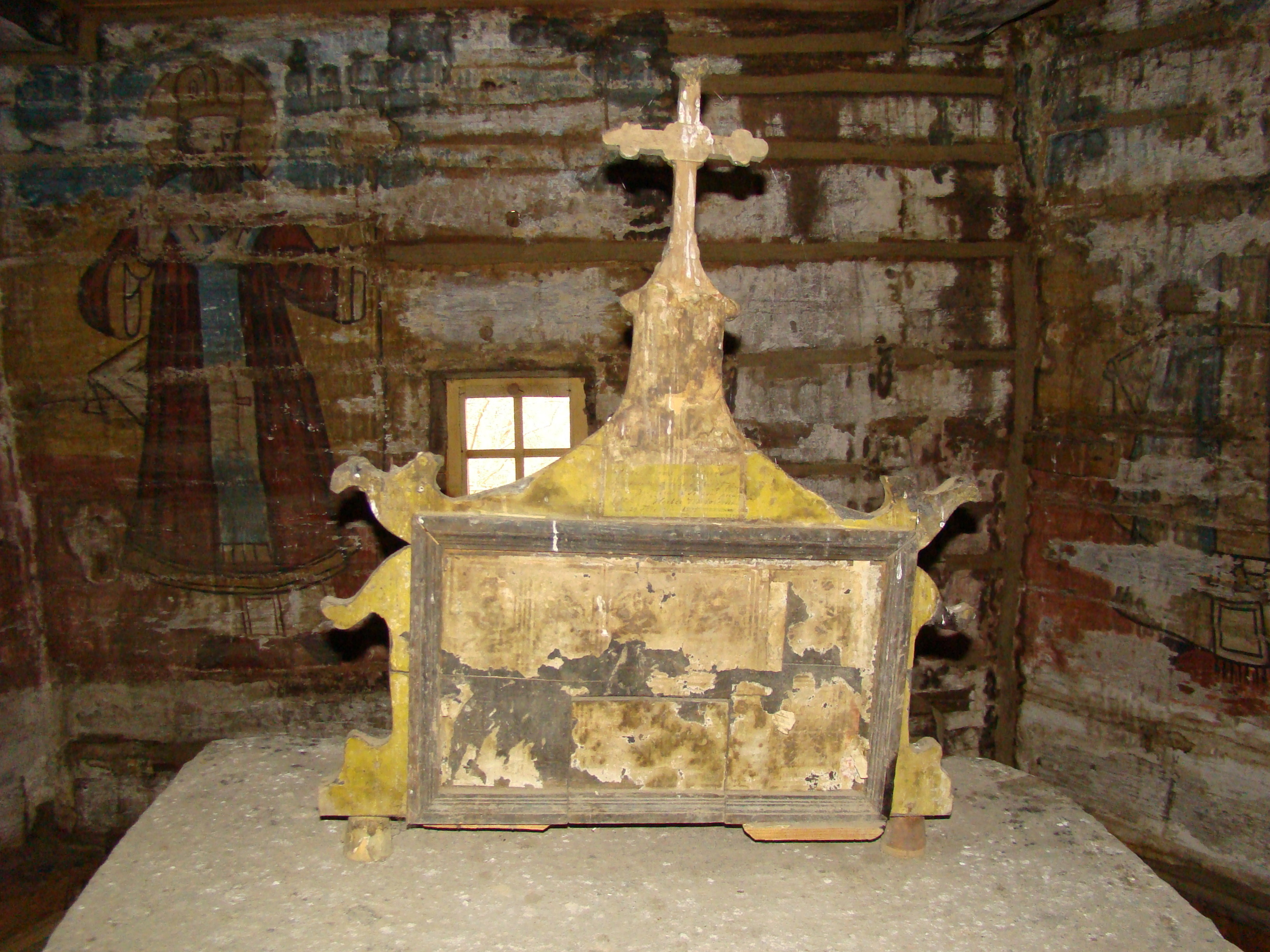 Biserica de lemn din Troaș